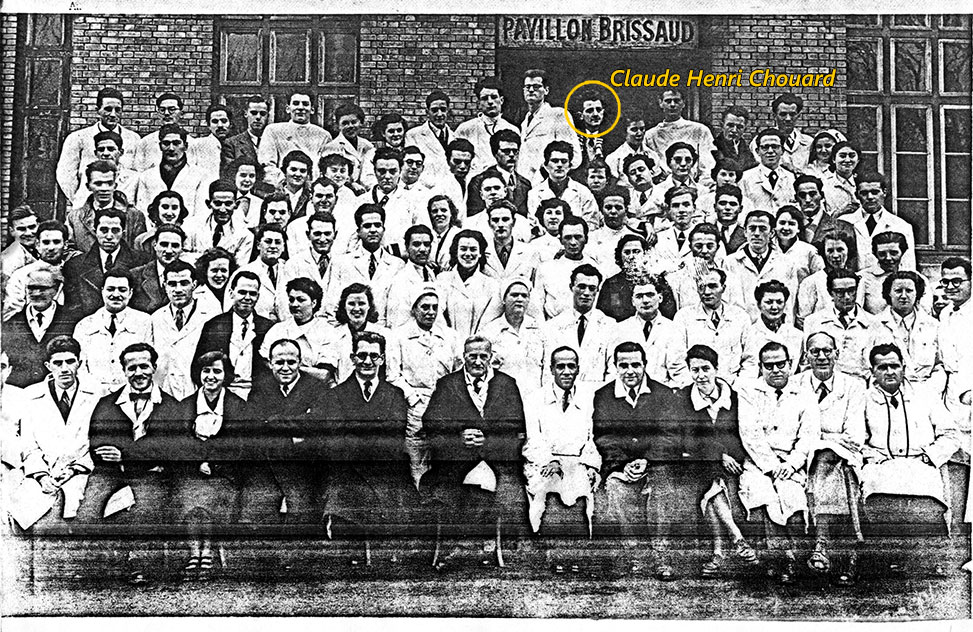 Claude Henri Chouard en 1er année de classe de Médecine (1950)